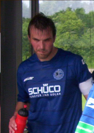 Kaptän Carsten Rump